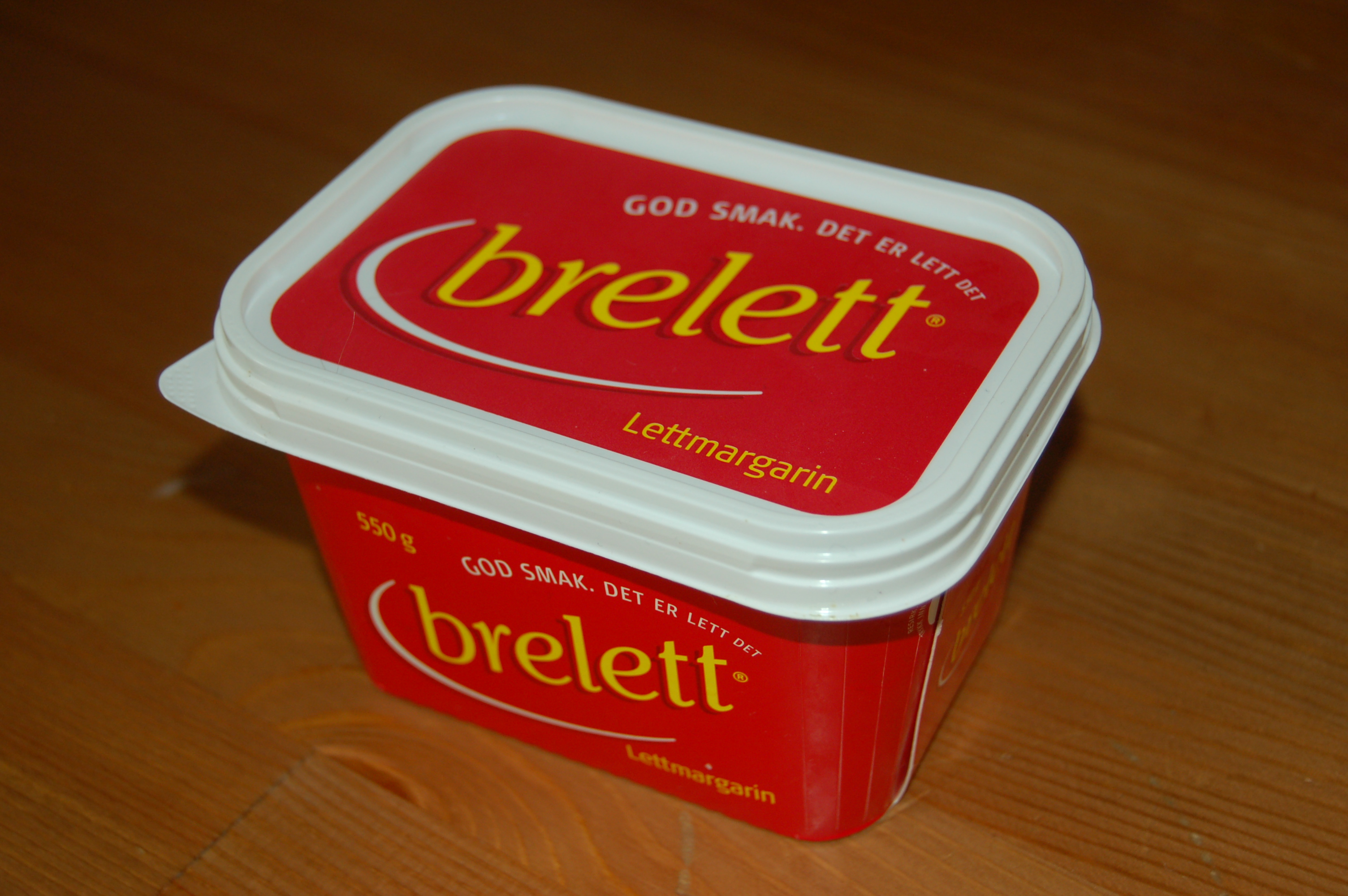 Brelett 550g margarine